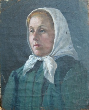 П. Южык. Швагерка